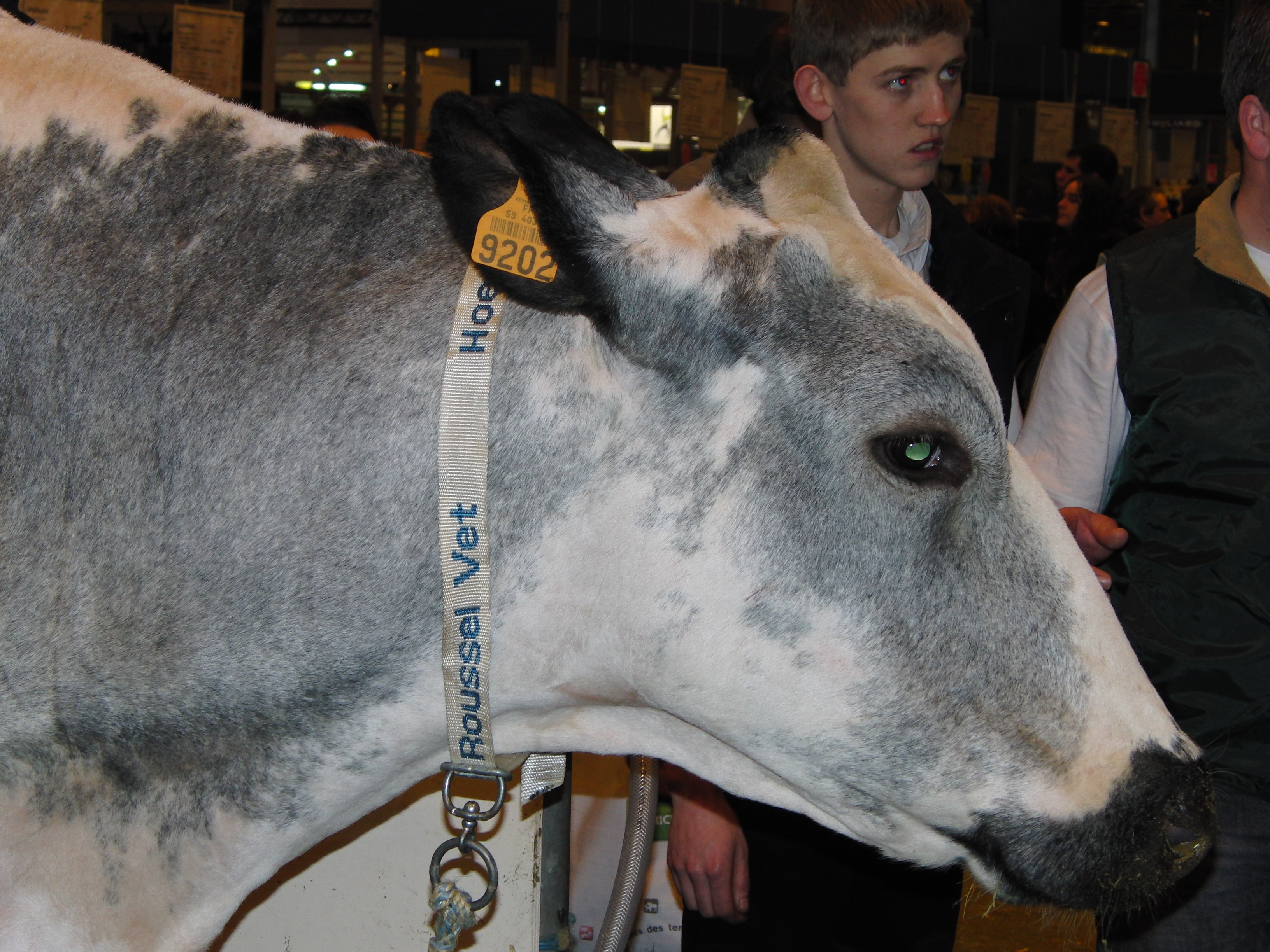 Vache Bleue du Nord - Salon de l'Agriculture 2010